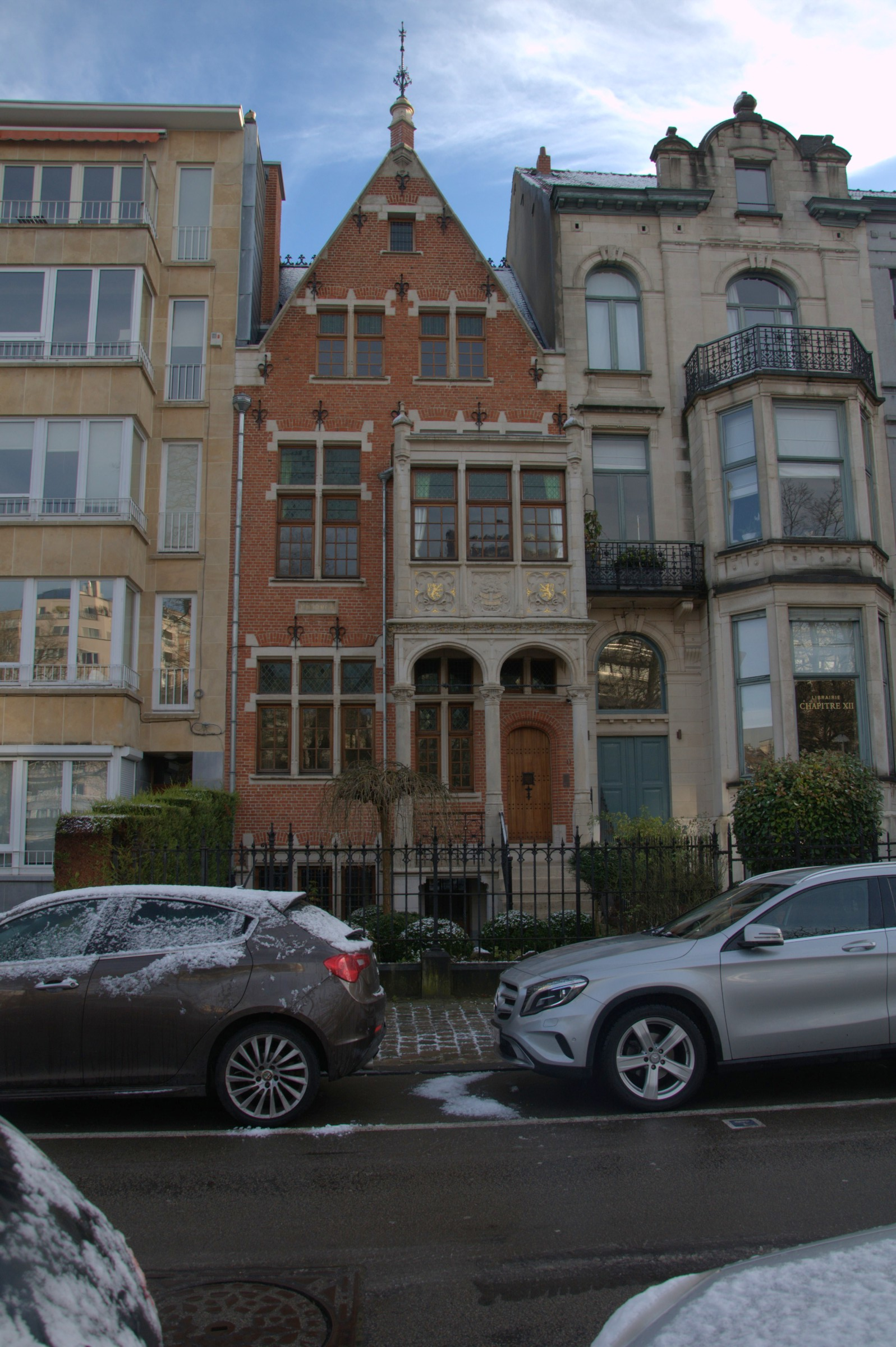 patrimoine immobilier de bruxelles